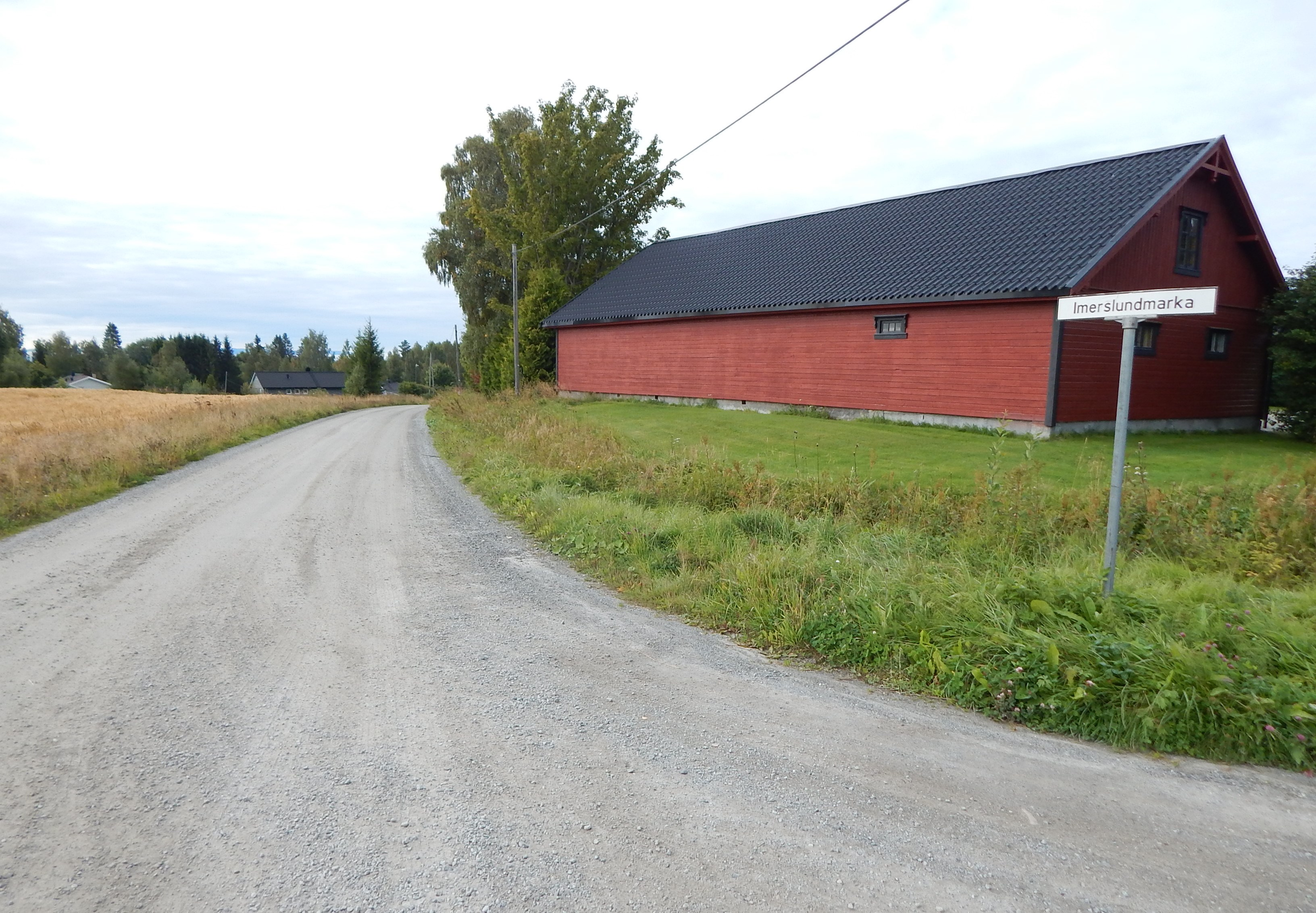 Imerslundmarka (fylkesvei 1802, tidl. 106) sørover fra Bjørgedalsvegen